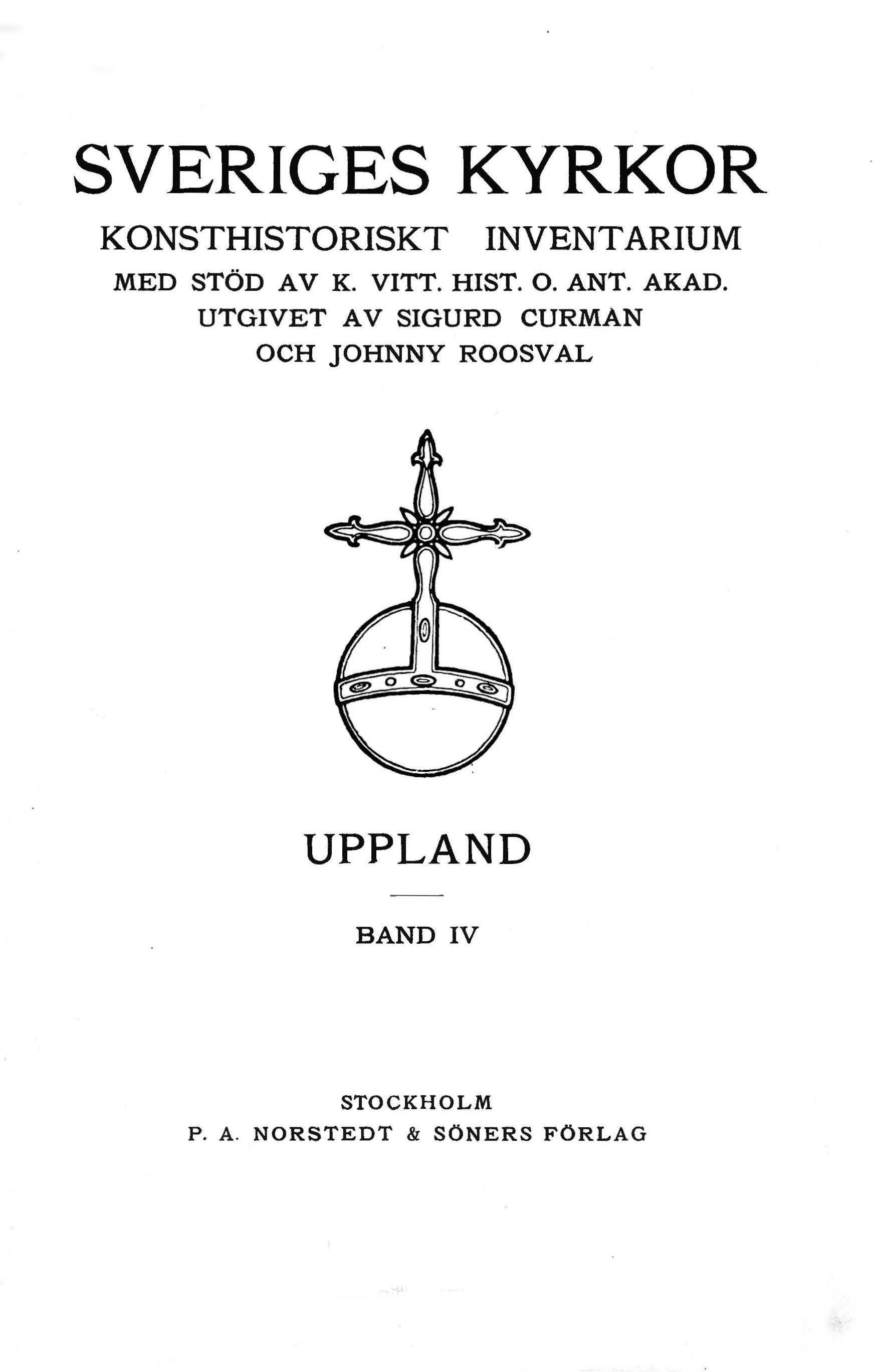 Sveriges kyrkor, Volume 1, title-page